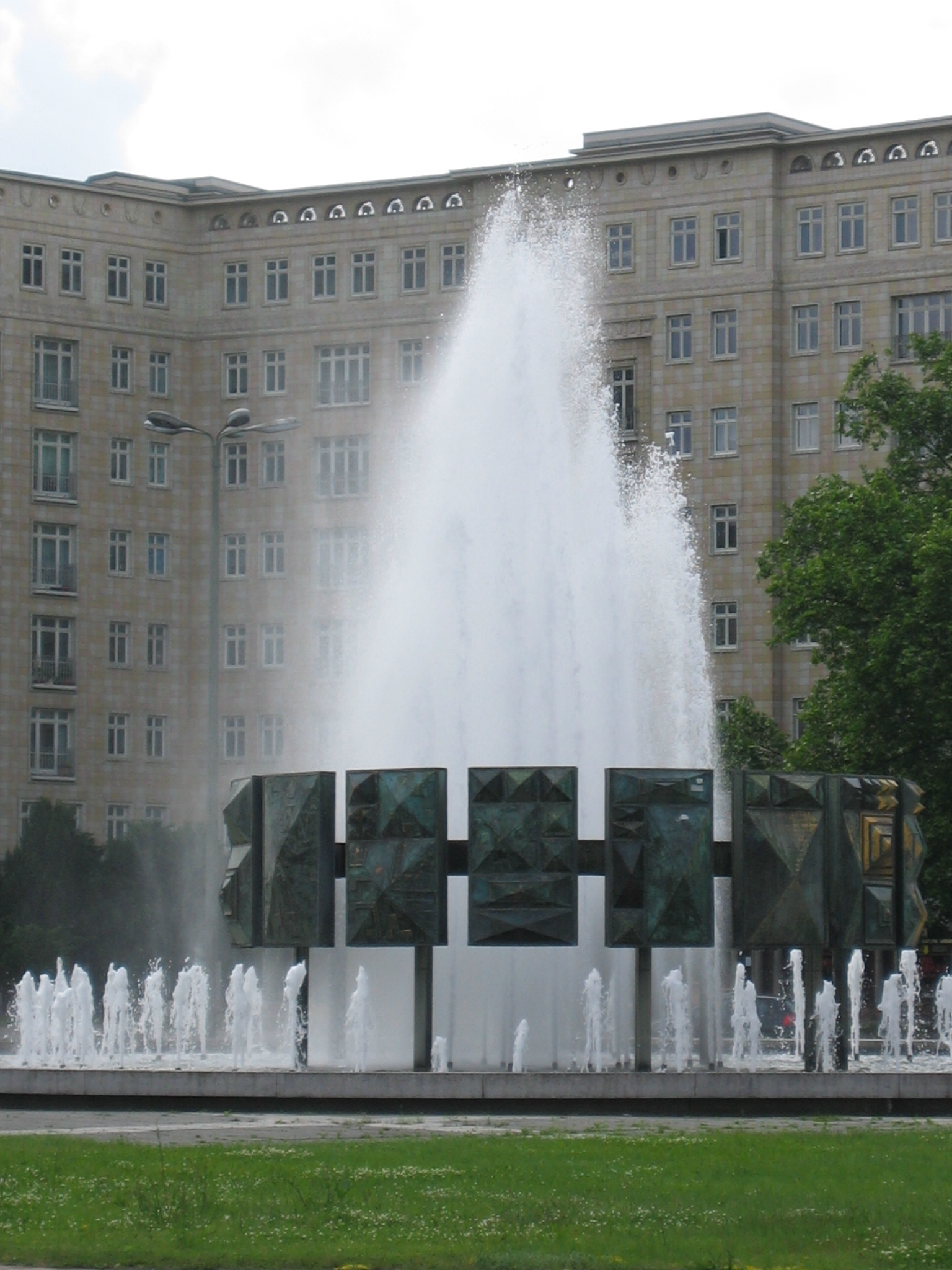 Strausberger Platz, Berlin-Mitte, Brunnen "Schwebender Ring" / Fountain "Floating Ring", 1967, Architect: Fritz Kühn Photo: Martin Püschel